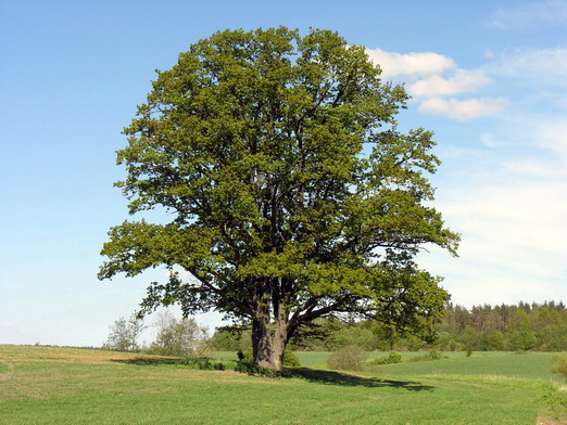 Paprastasis ąžuolas (Quercus robur) Šeima. Bukiniai (Fagaceae) Foto: Algirdas, 2006 m. birželio 3 d.